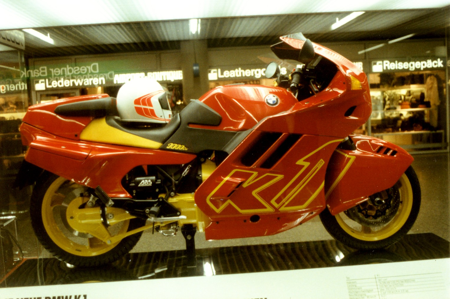 BMW K1 at Frankfurt am Main airport in Germany, BMW K1 auf dem Flughafen in Frankfurt am Main, Deutschland